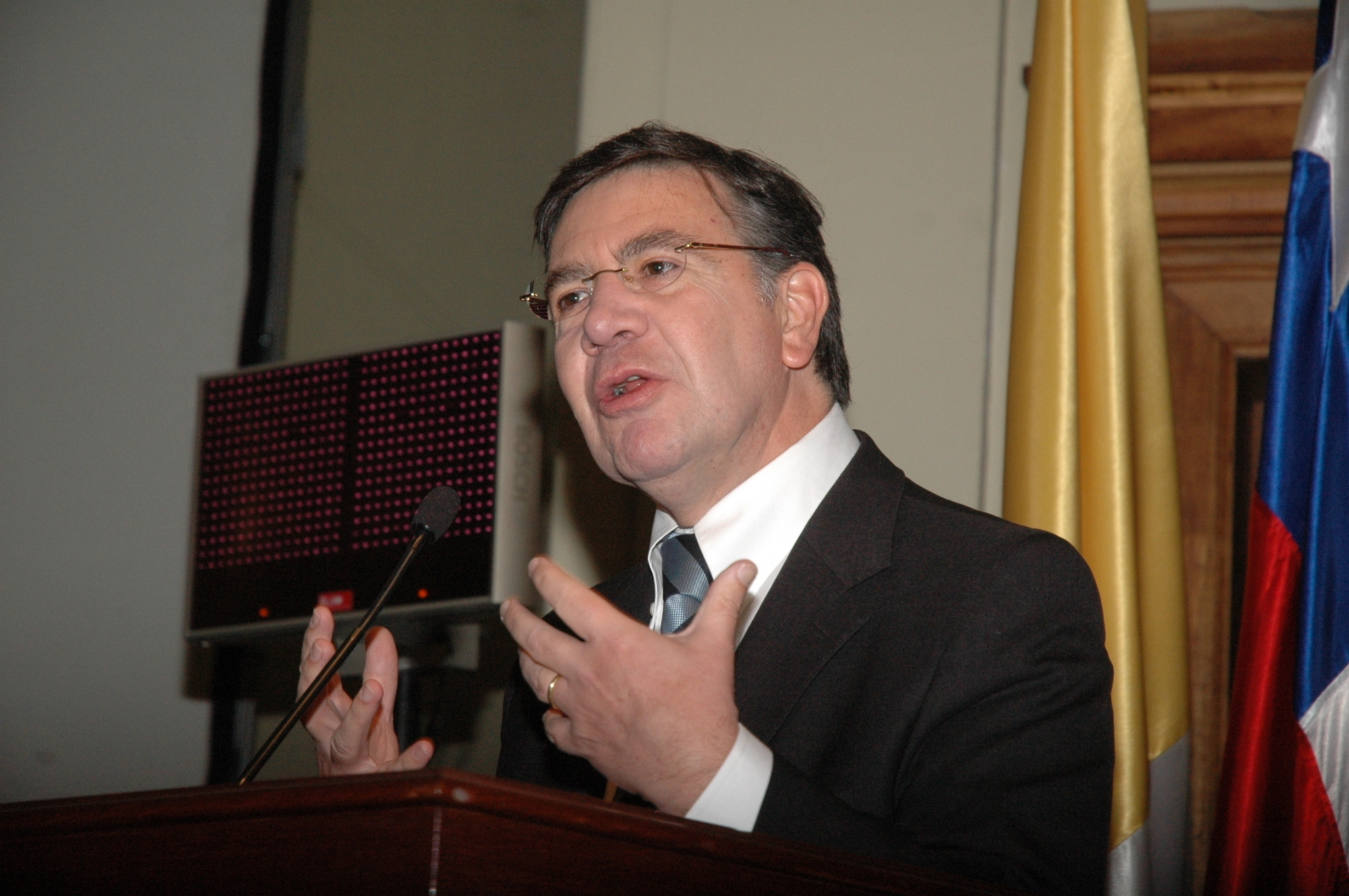 Joaquín José Lavín Infante (*Santiago, 23 de octubre de 1953) es un ingeniero comercial, académico y político chileno, dos veces candidato a la presidencia y actual ministro de Educación de Chile.